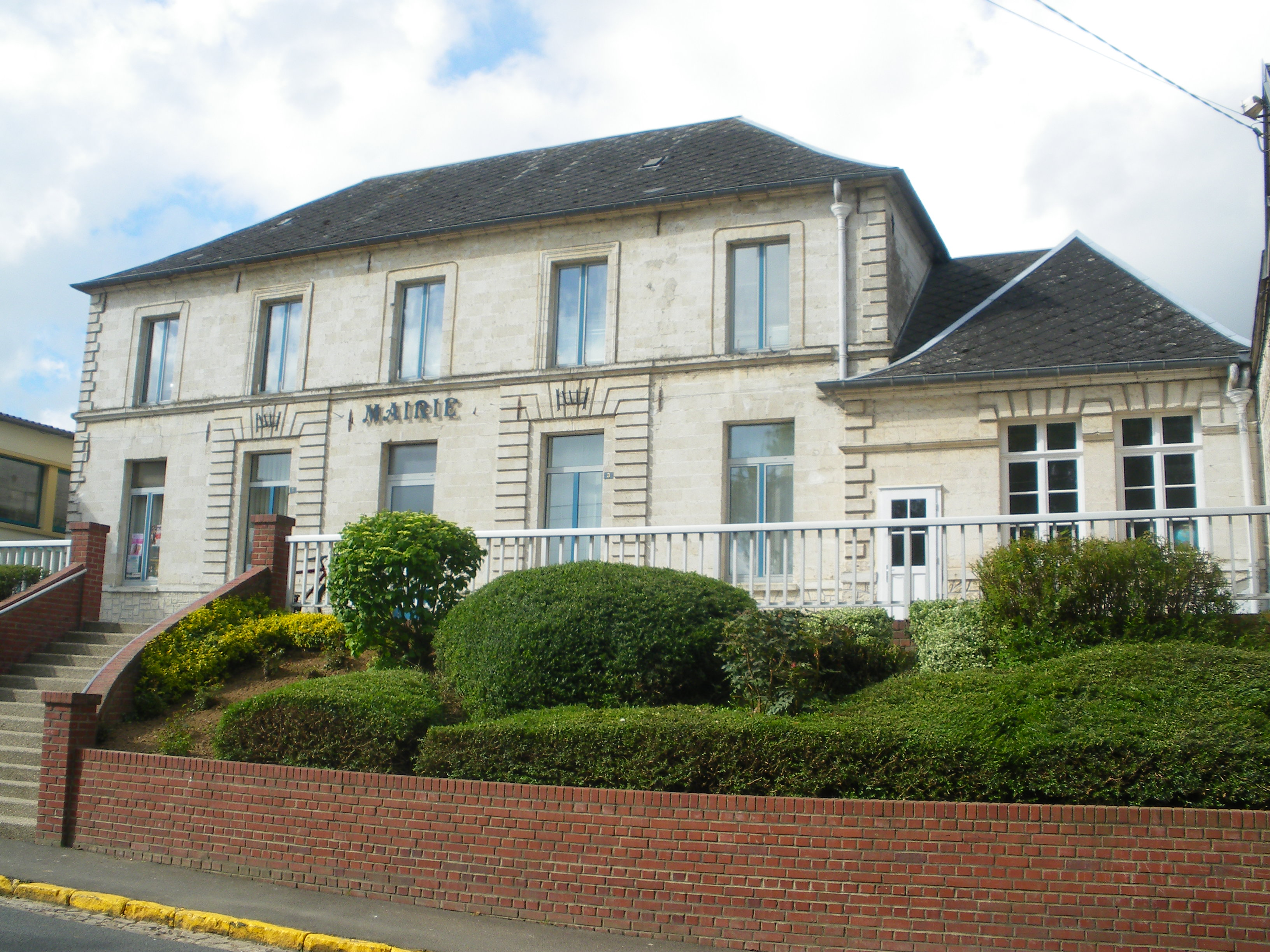 Vue de la mairie de Wanquetin.